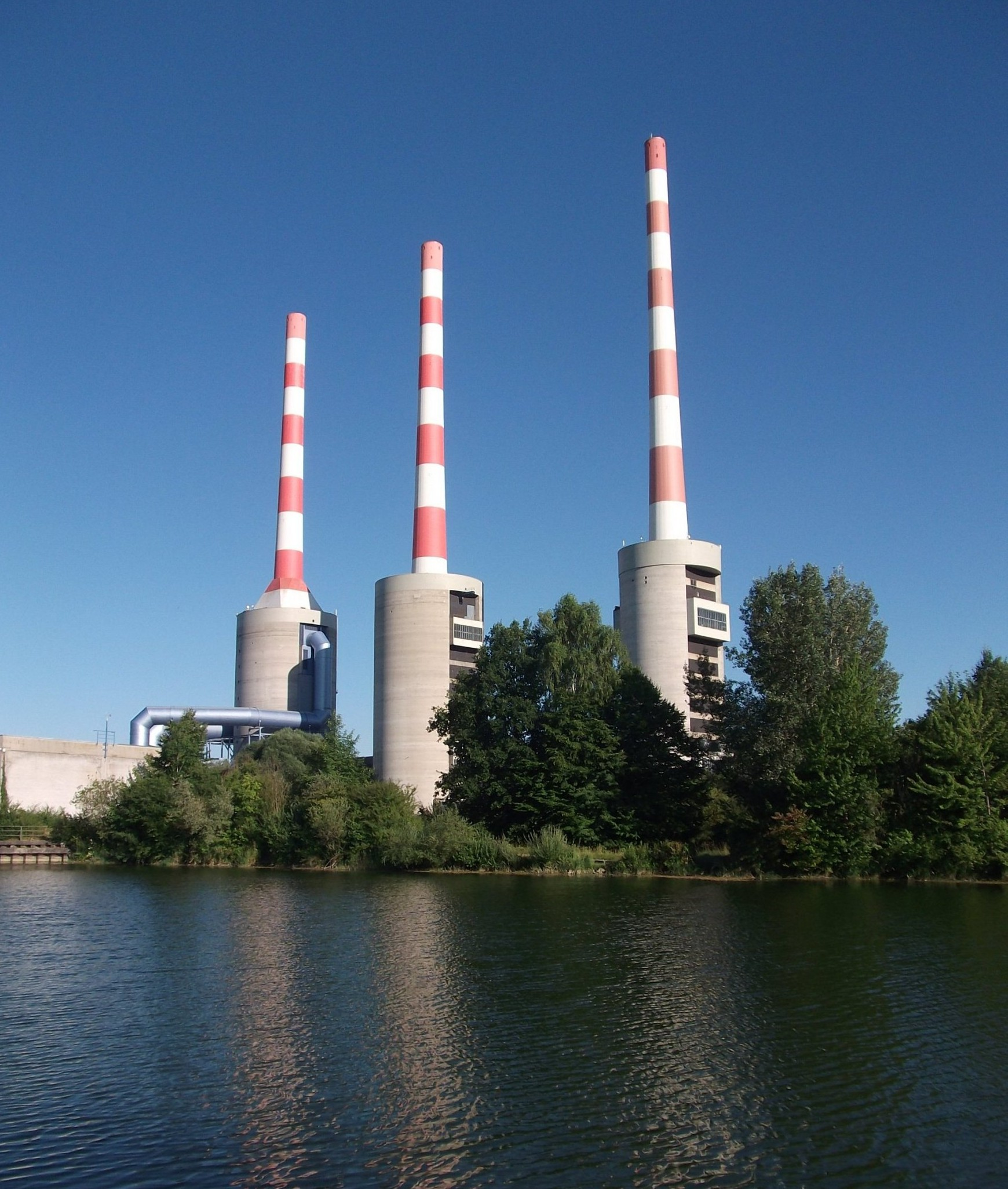 Erdgas-Kraftwerk Irsching